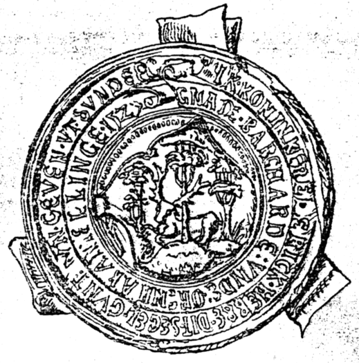 Herredets segl afbilder en hjort imellem bakker og træer. Seglet stammer fra 1500-tallet. Det er udstedt af kong Frederik 1.